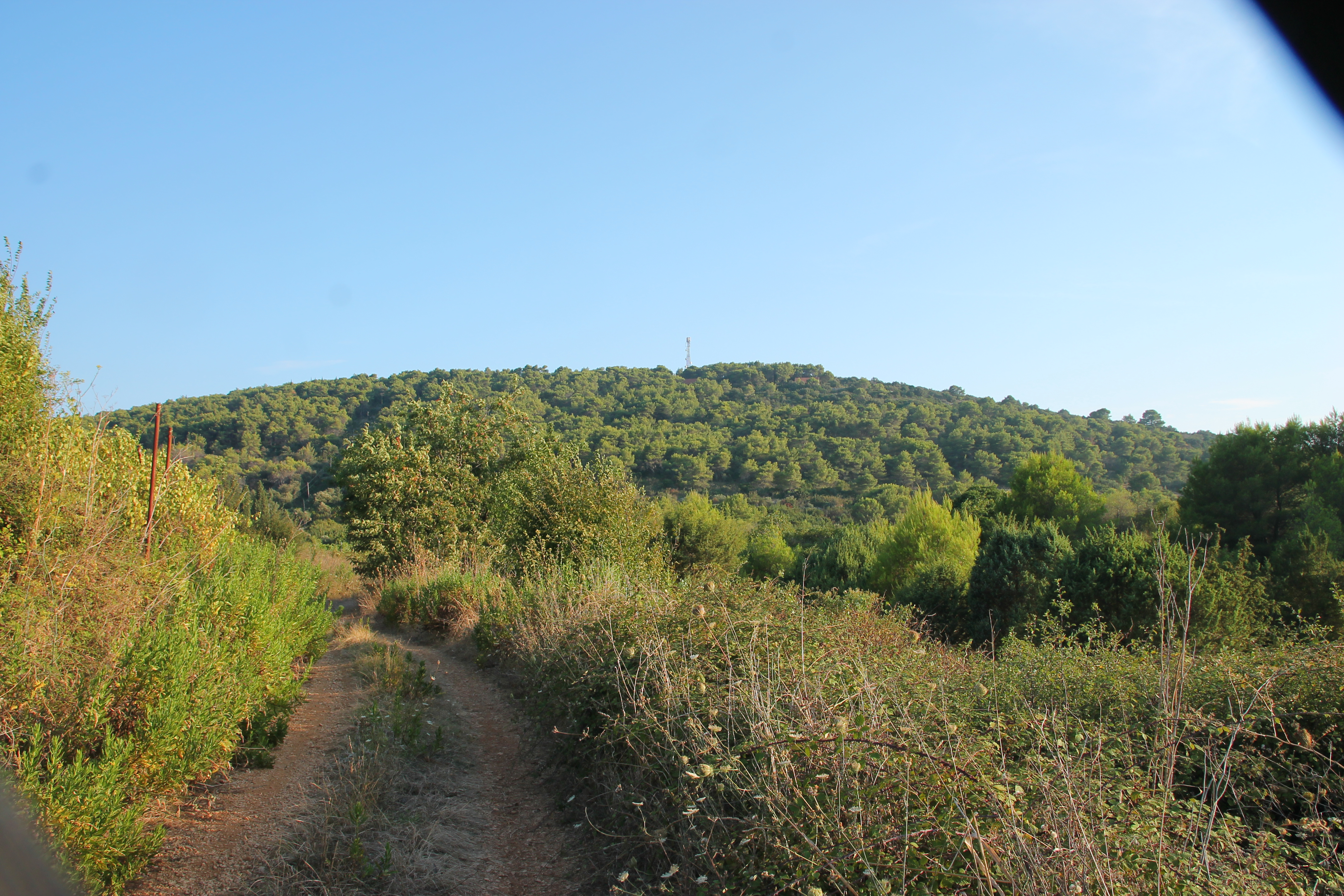 Vela straža (Grohote), cesta k vrcholu